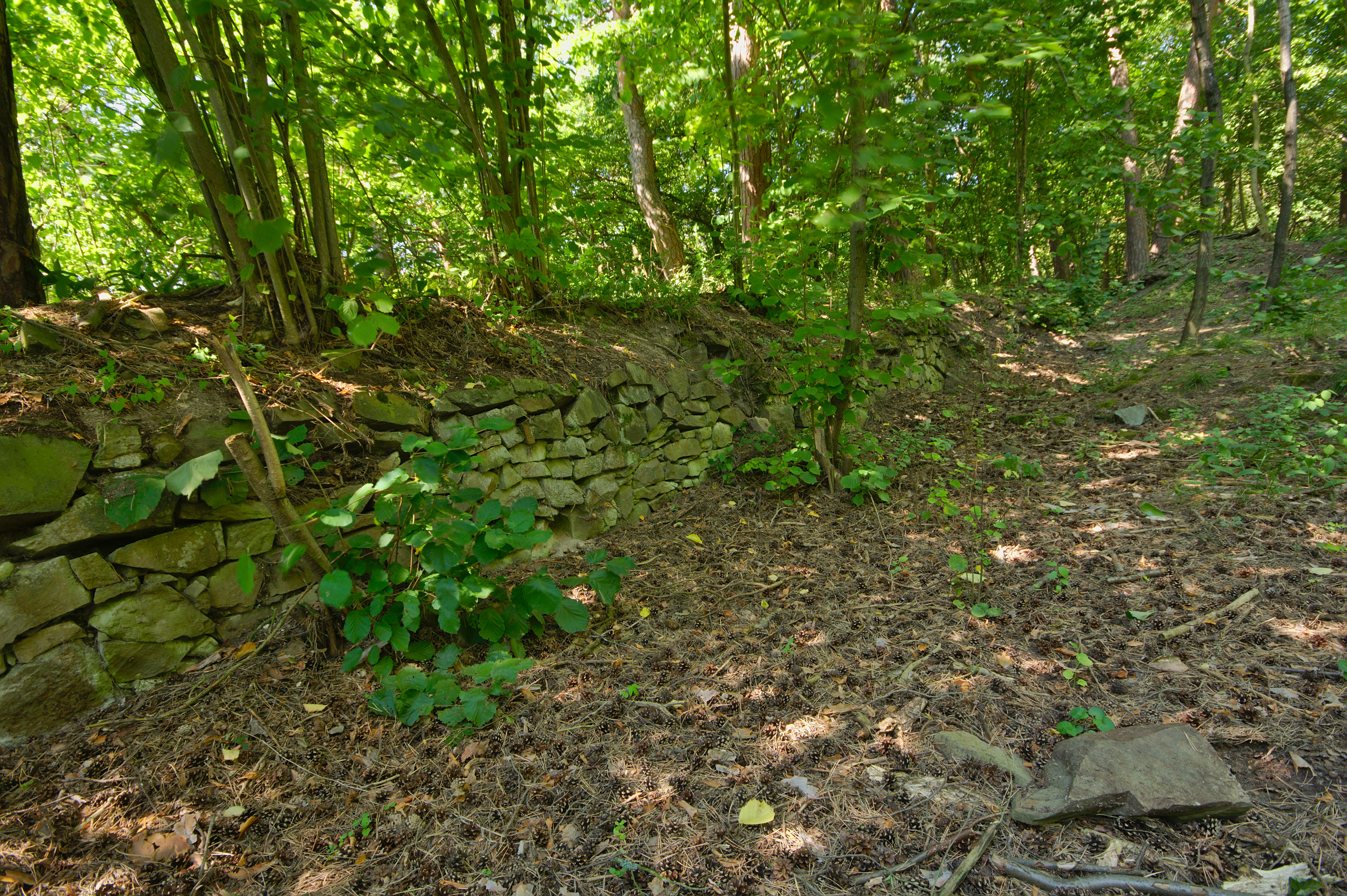 Zřícenina hradu Melice, Vojenský újezd Březina, okres Vyškov